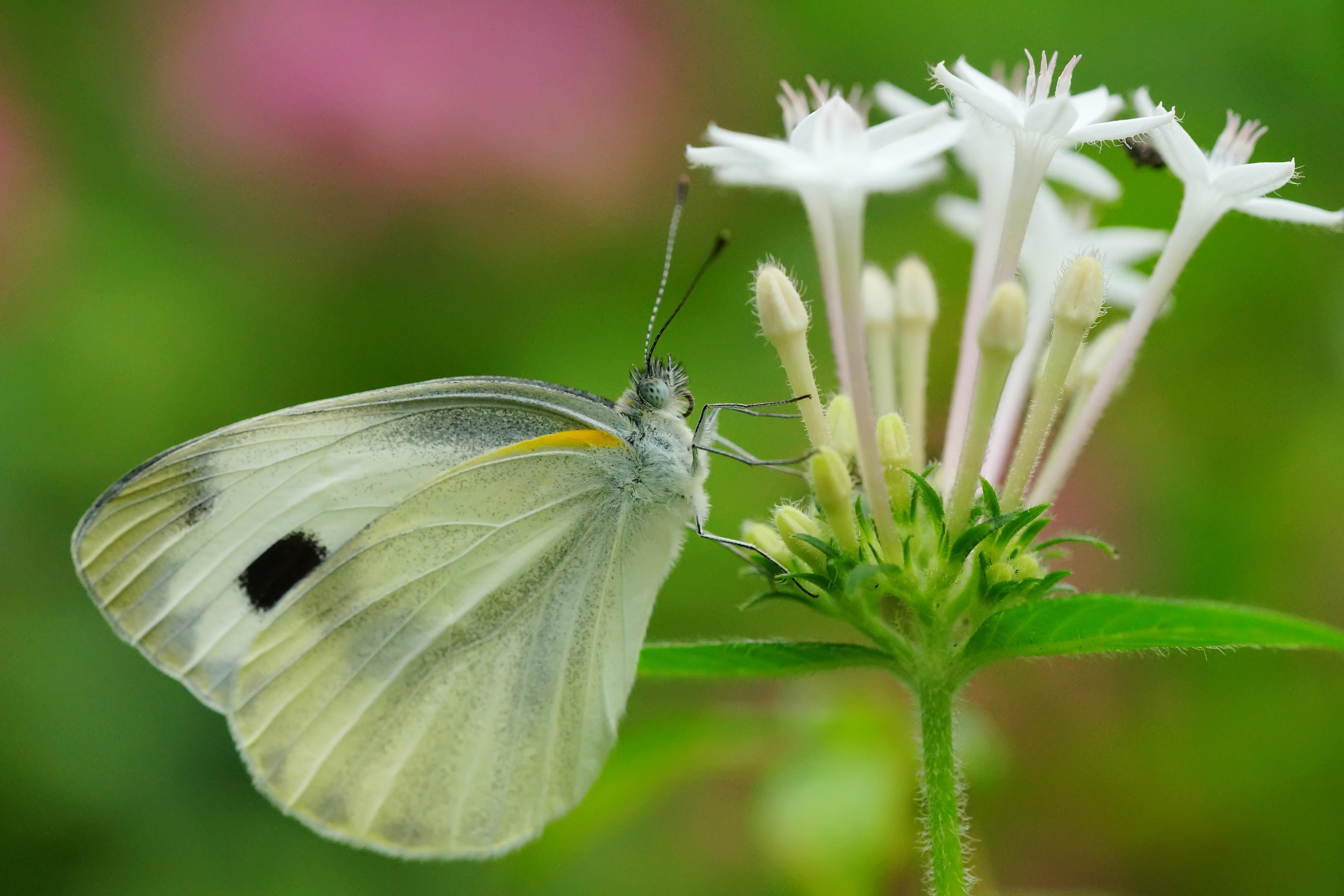 緣點白粉蝶 Pieris canidia